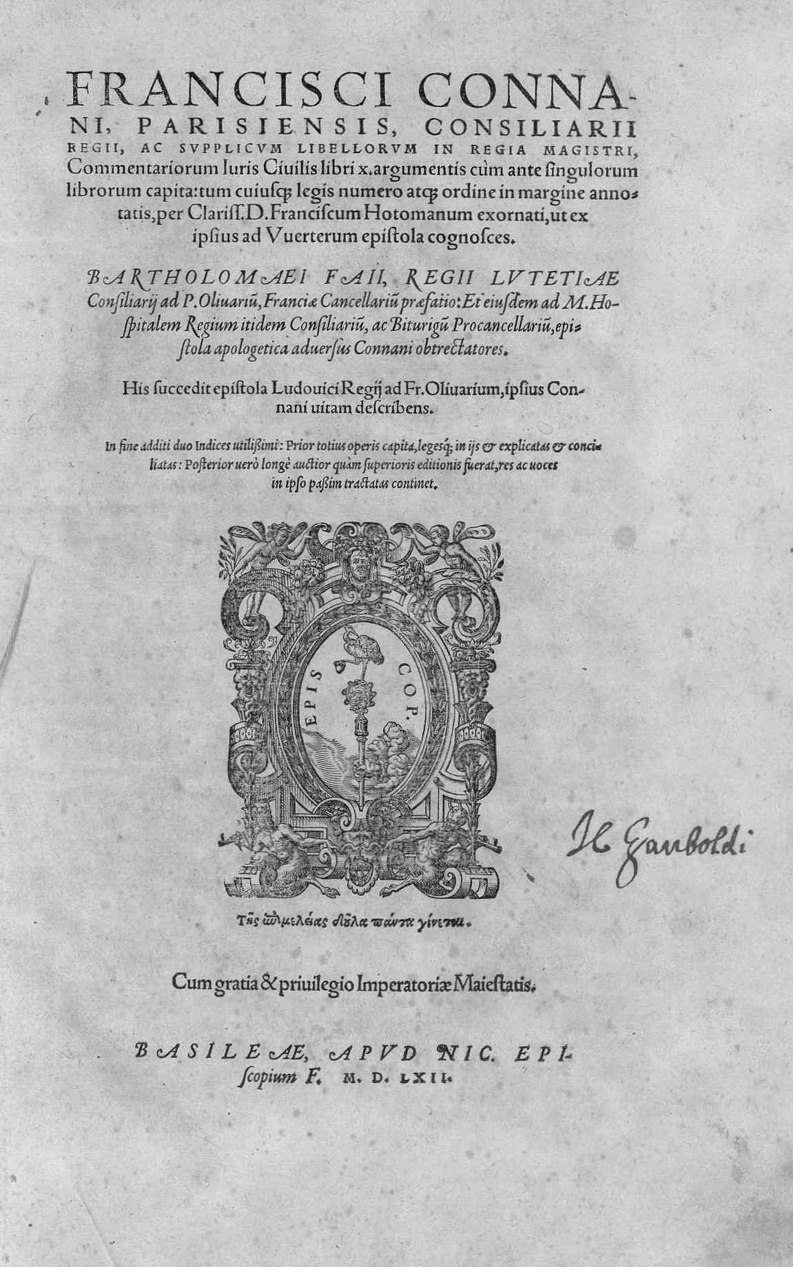 Frontespizio